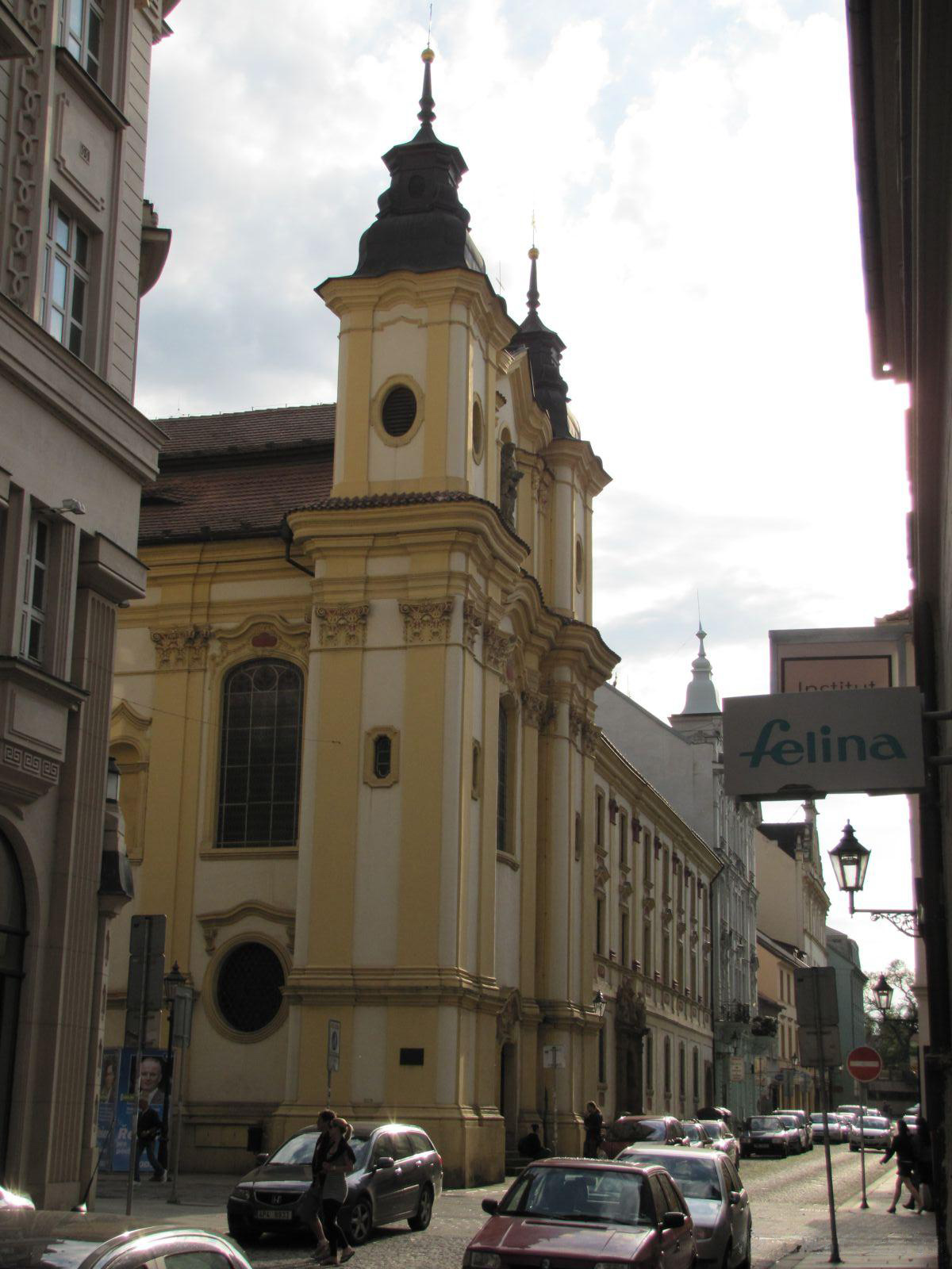 Kostel sv. Anny v Plzni